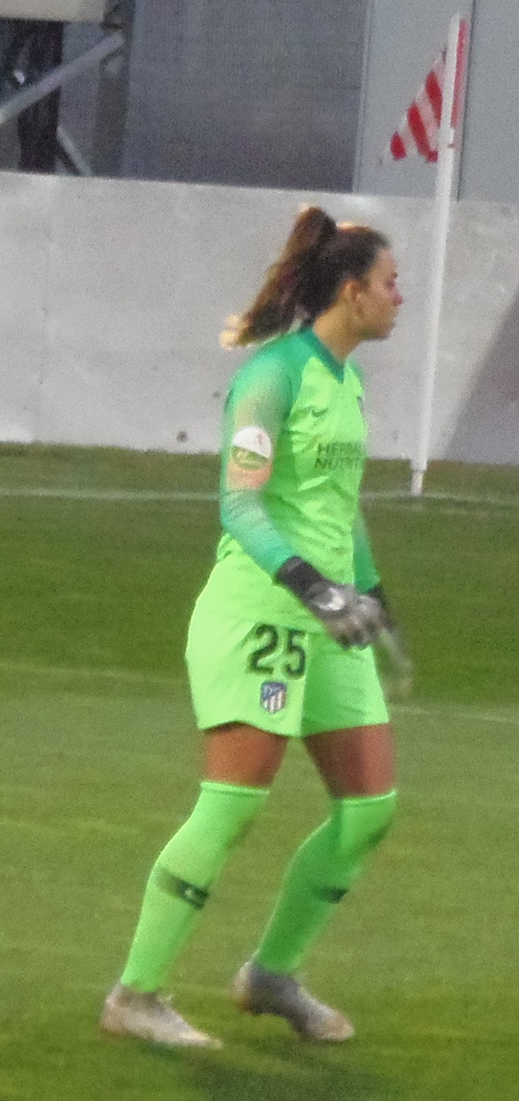 María Isabel Rodriguez, Misa, en su debut en Copa de la Reina con el Atlético de Madrid el 25 de noviembre de 2018